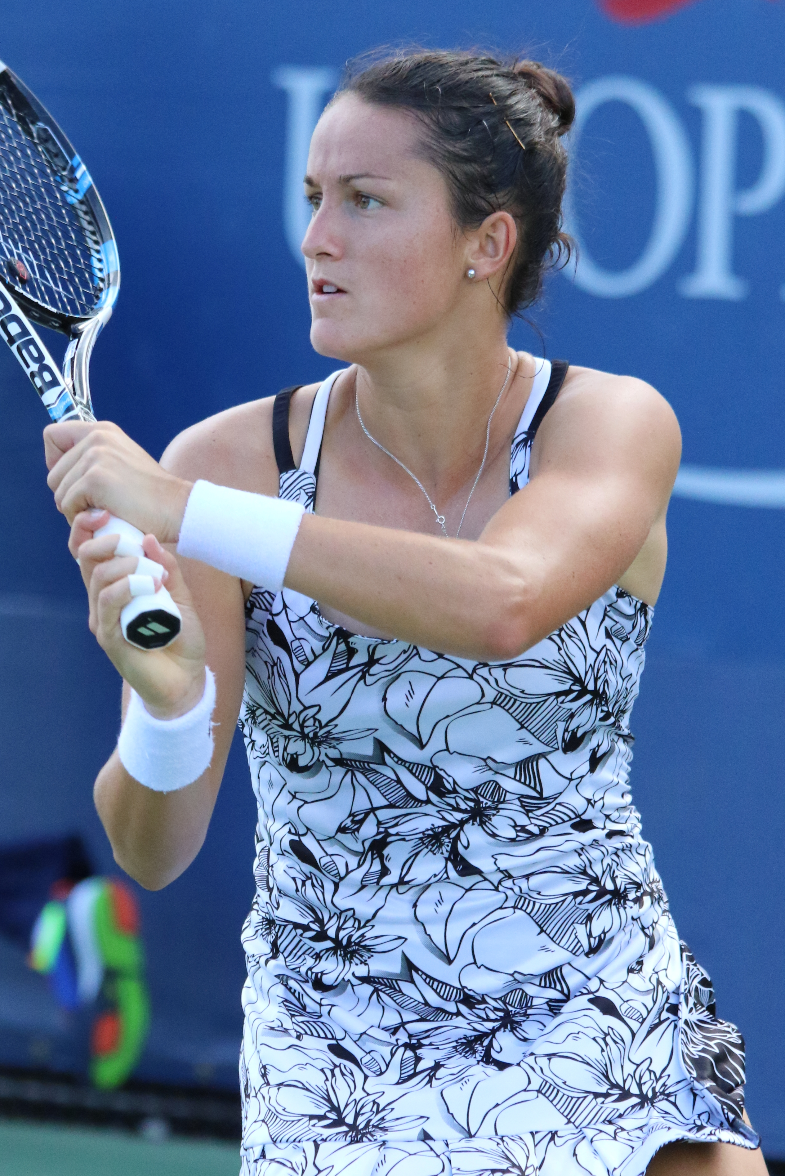 Arruabarrena US16 (19)